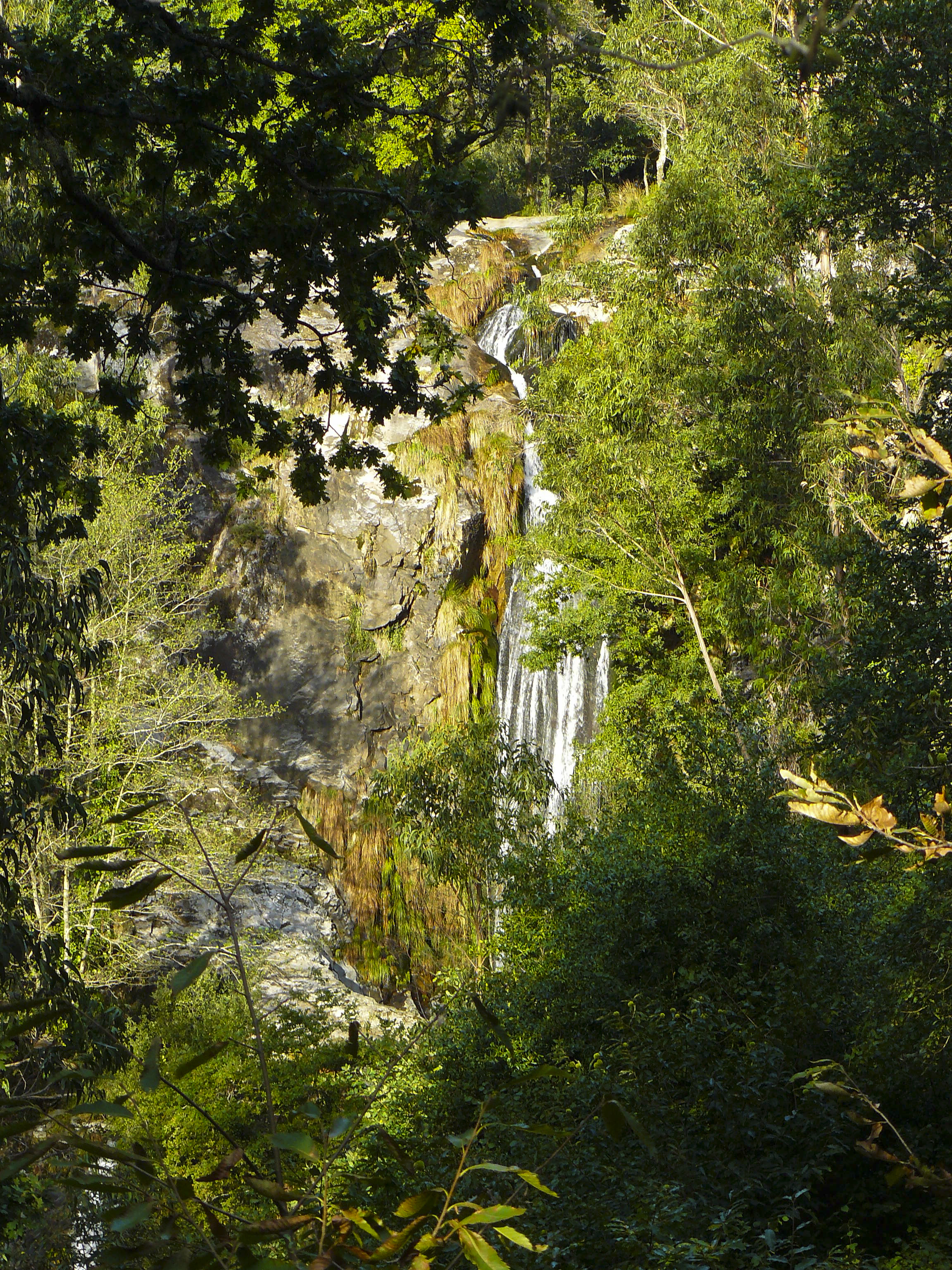 Fervenza do río Sieira, A Madanela, Ribasieira, Porto do Son